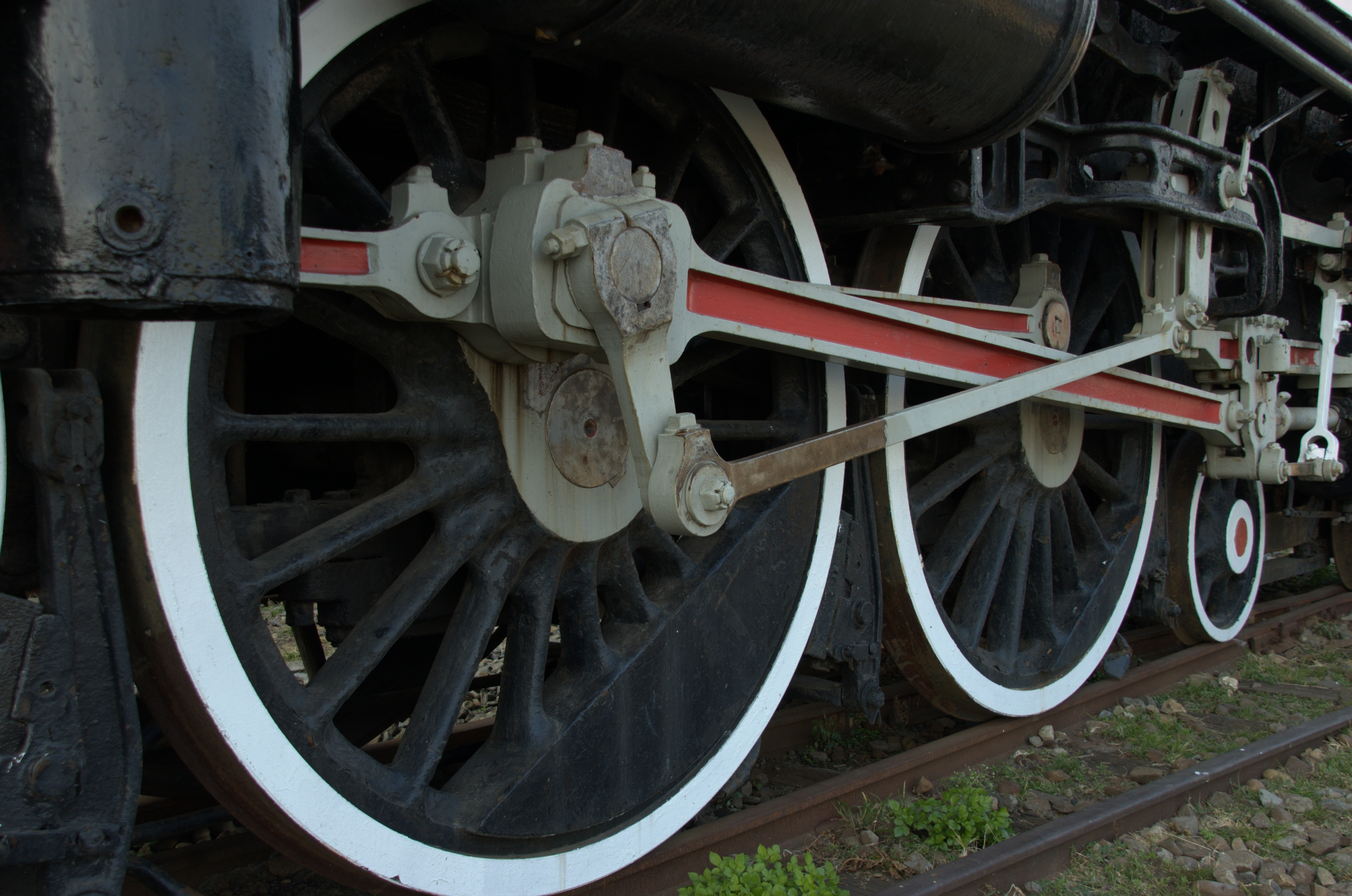 動輪直徑沿襲C51型的1750mm大型車輪，輪心為傳統輻湊式設計，中心輪轂附近追加有「蹼狀」造型設計，如此可改善強度及避免龜裂。